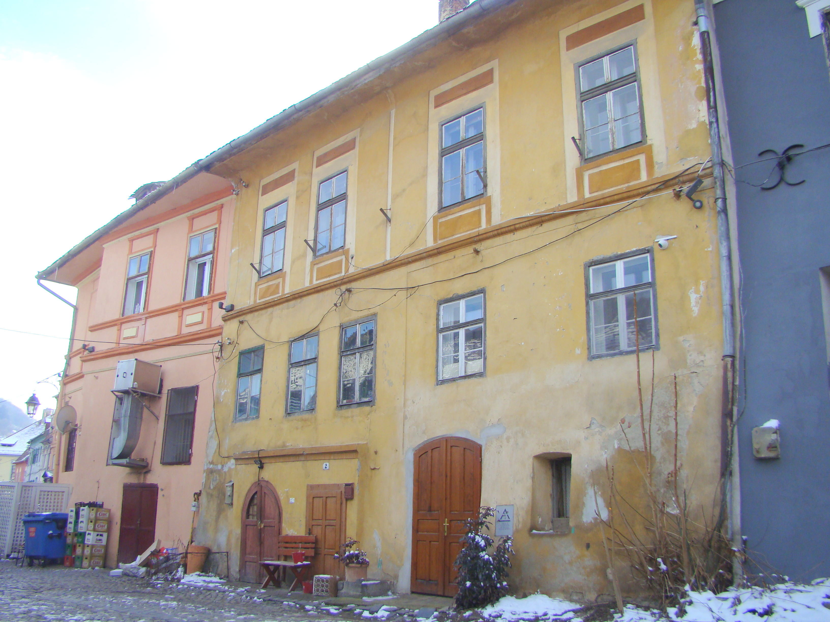 Fostul „Magyar Casino”, municipiul Sighișoara, Piața Oberth Hermann 2 1675 - 1700, 1850-1900